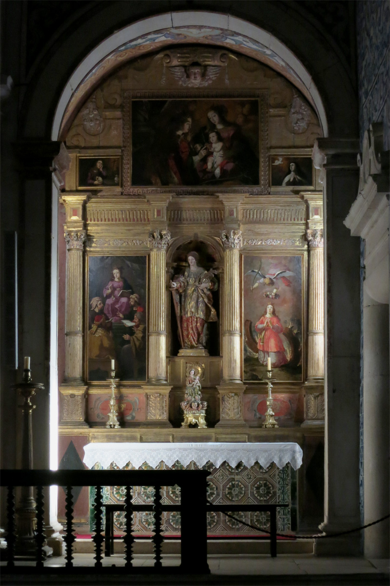 Josefa de Óbidos e outros, Retábulo do casamento místico de Santa Catarina, 1661, igreja de Santa Maria, Óbidos